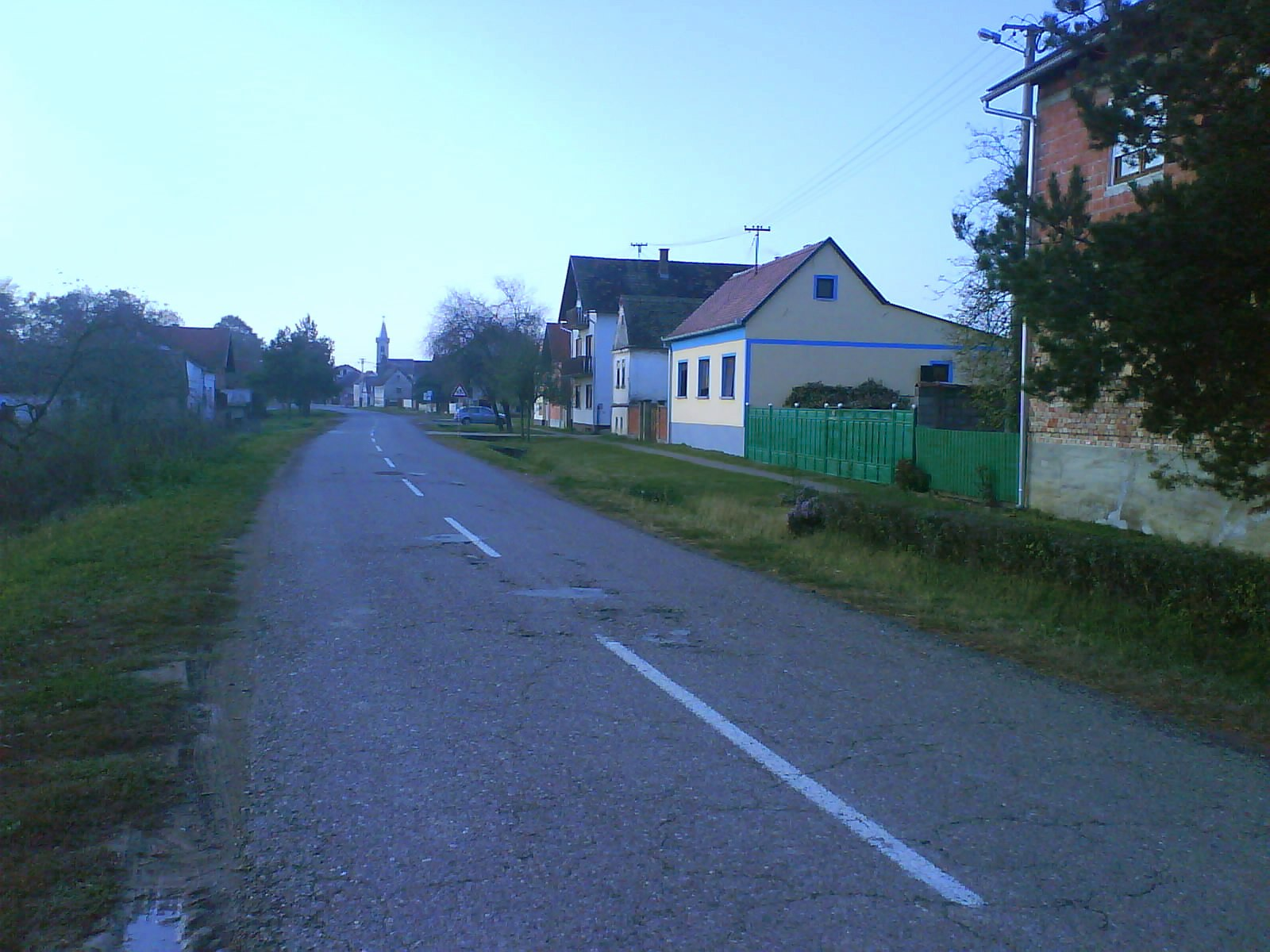 Banovci u jesen 2009. godine